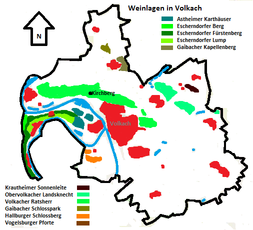 Legende: blau - Wasserflächen (Main, Seen) rot - besiedelte Fläche (Ortsteile) verschiedene Grünstufen - Weinlagen der Großlage Volkacher Kirchberg verschiedene Braunstufen - großlagenfreie Weinlagen